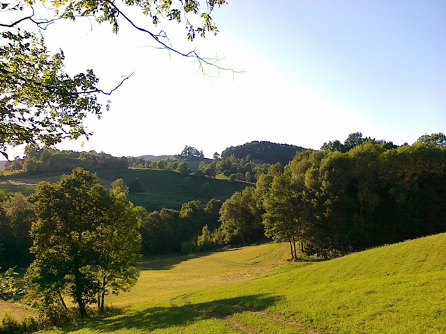 Црна долина, општина Приједор.